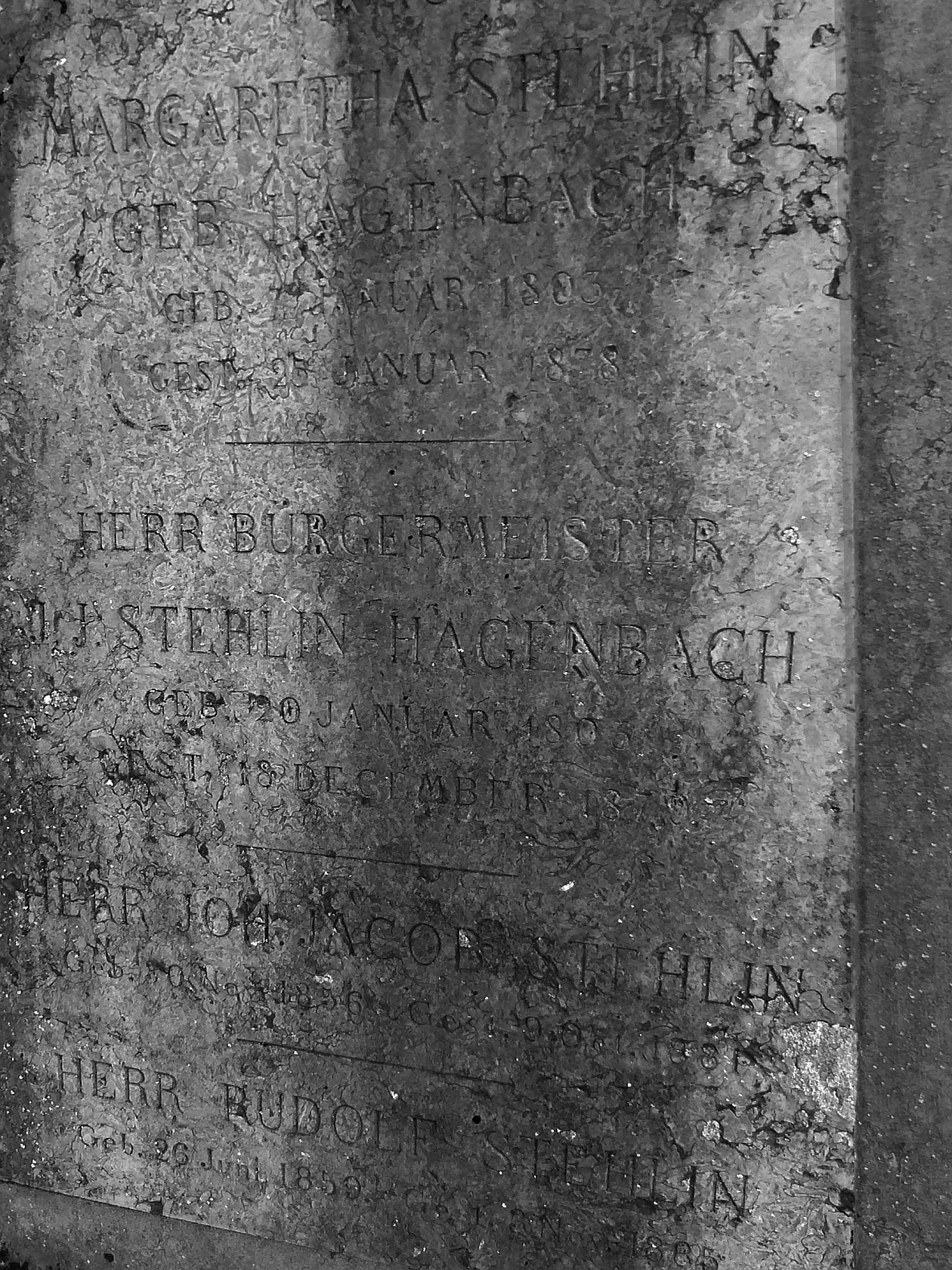 Johann Jakob Stehlin der Ältere (1803–1879) Zimmermann, Baumeister, Bürgermeister, Politiker, u.a Vizepräsident des Verwaltungsrats der Gotthardbahn, Grab auf dem Friedhof Wolfgottesacker, Basel